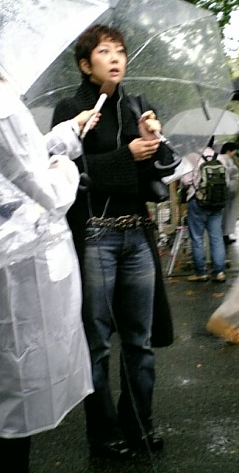 muroi